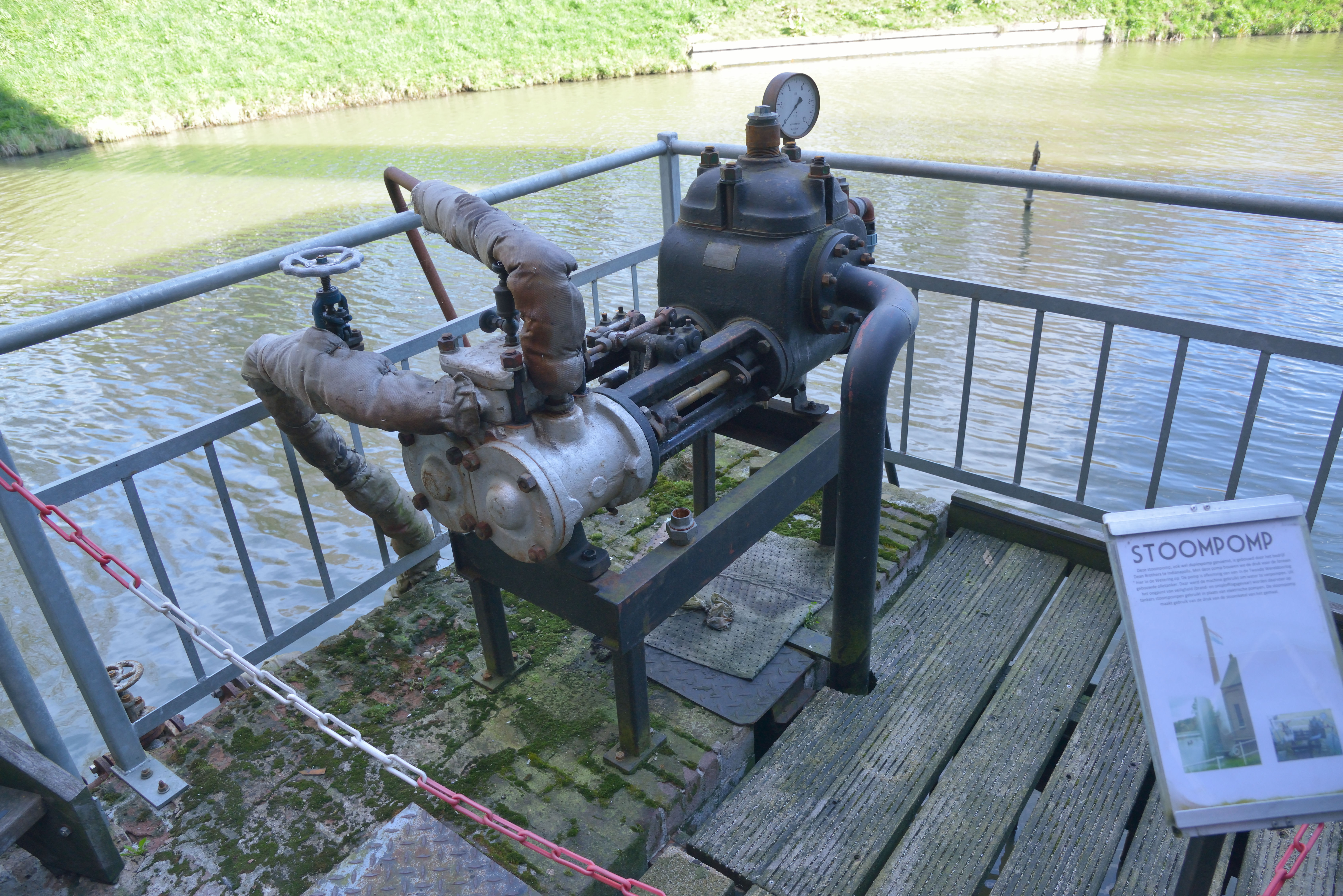 Stoompomp gebouwd door de firma Dean Brothers in Indianapolis en afkomstig van een in de Tweede Wereldoorlog gebouwde olietanker.